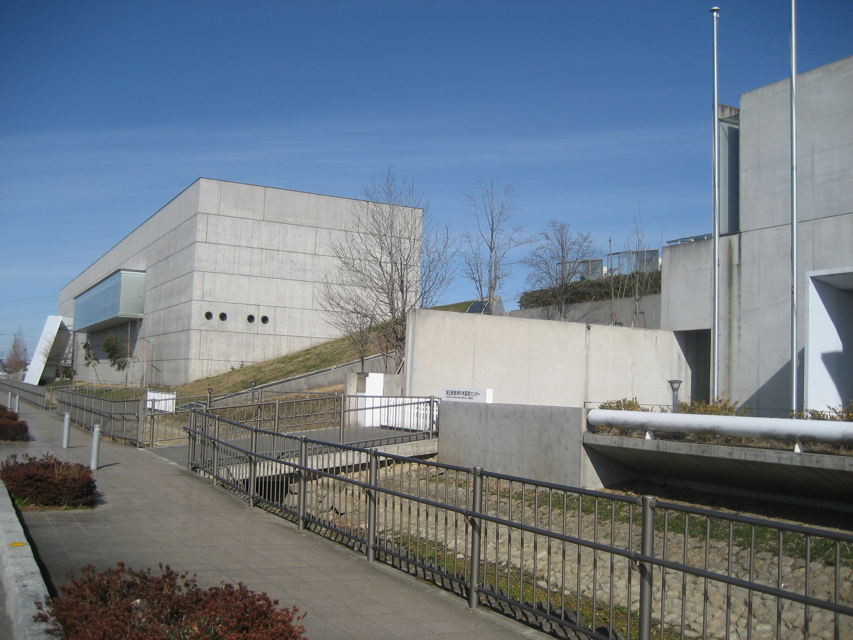 加須市にある埼玉県環境科学国際センター